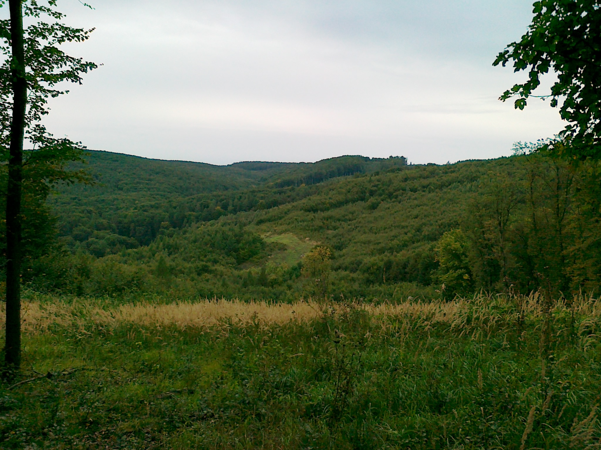 pohled Slepice